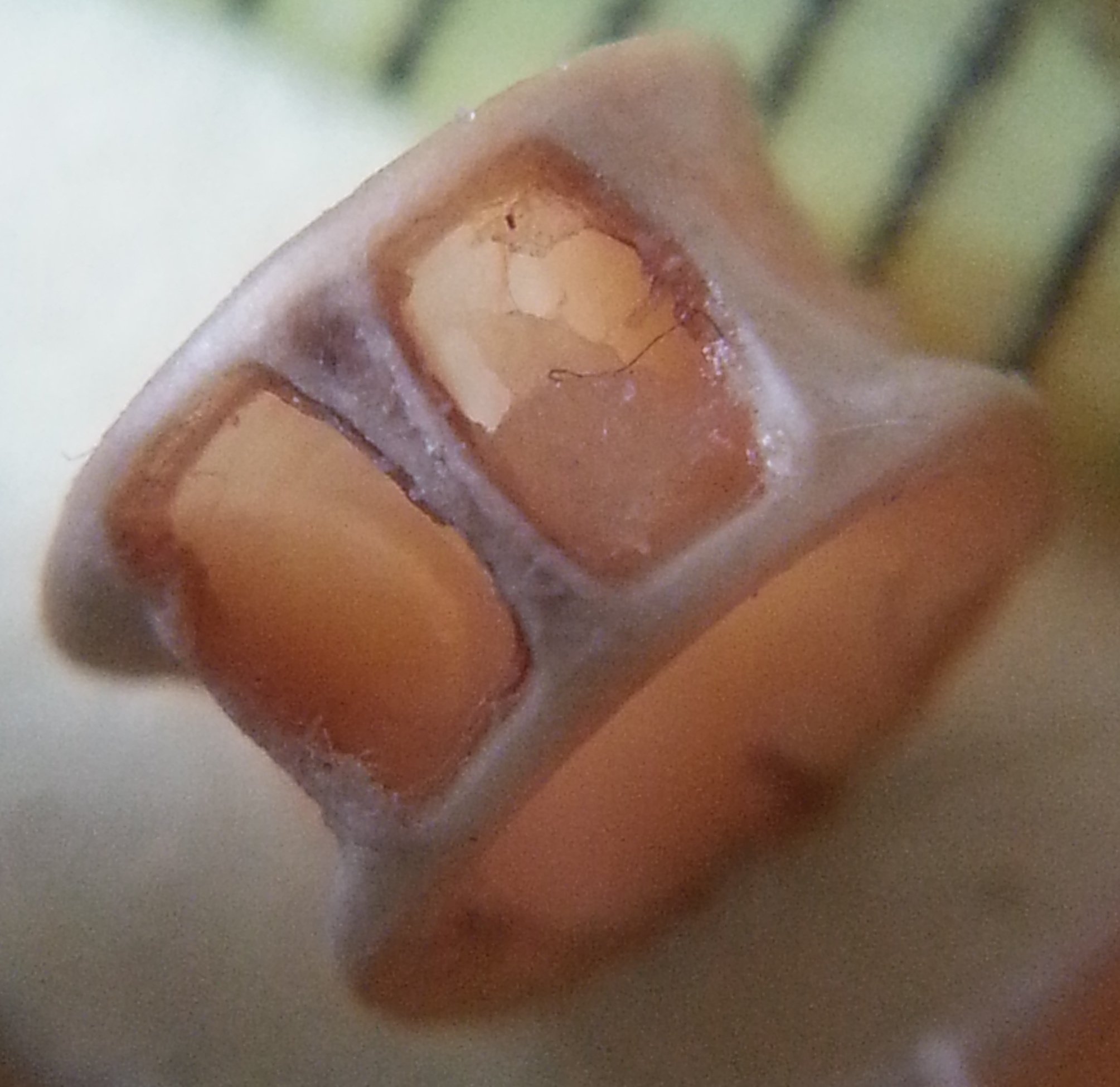 vertebra di pesce - diametro 5 mm